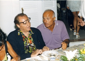 L'autore con Renzo Arbore